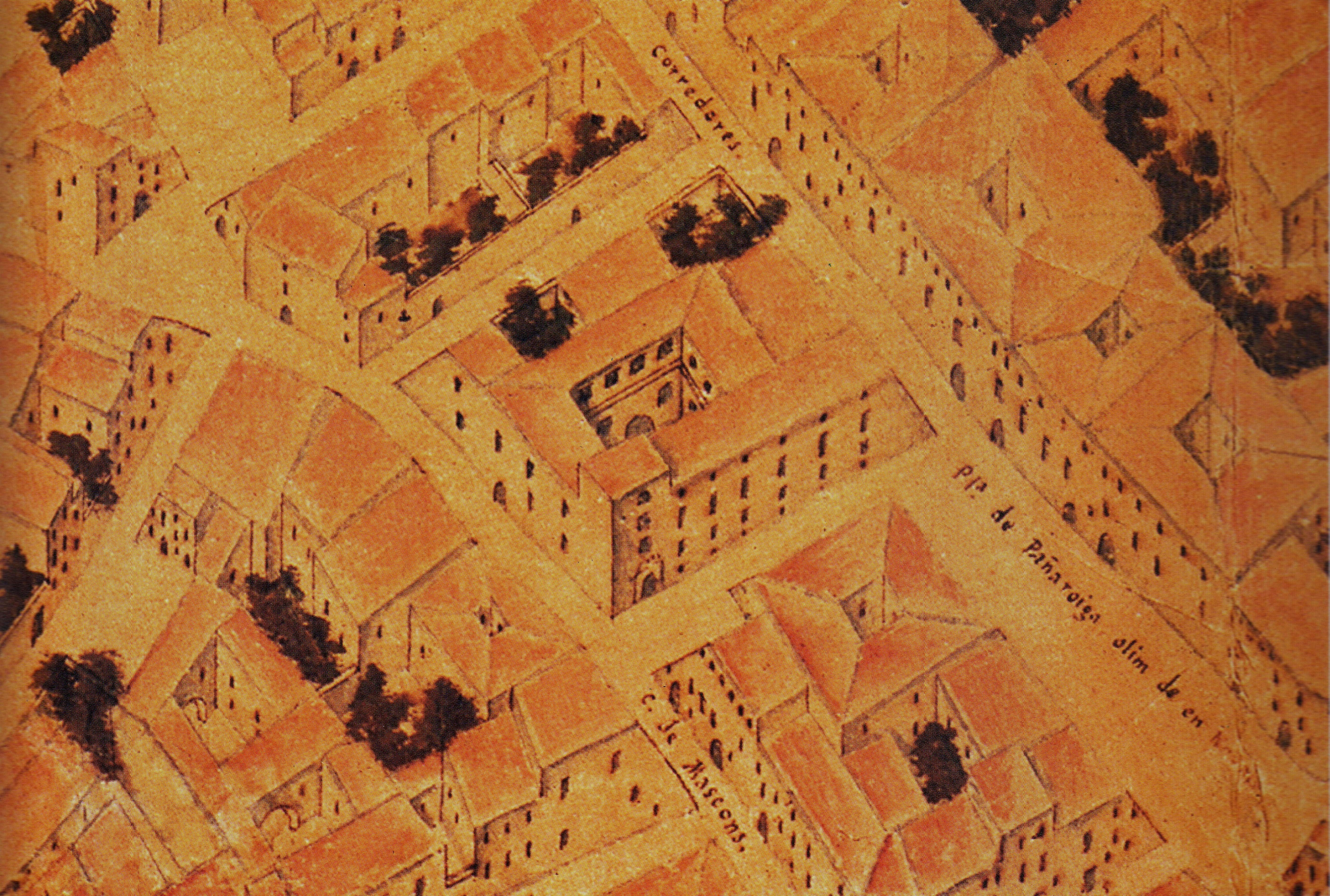 El palau de l'ambaixador Vich com apareix en el plànol de València de Tomàs Vicent Tosca de 1704.